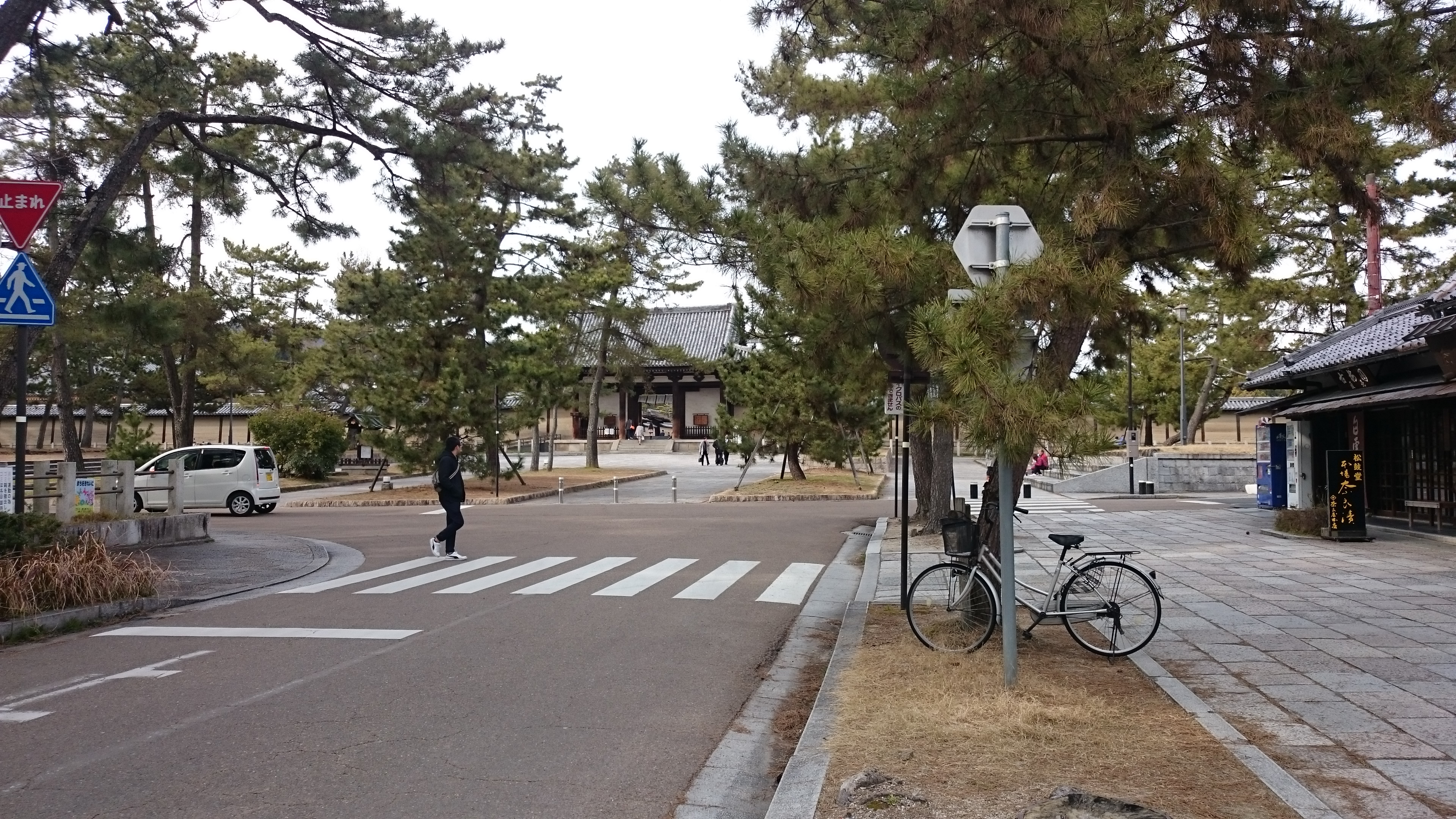 奈良県道266号 奈良自転車道の終点付近のです。（法隆寺南大門の前） 終点を示す標識は在りません。